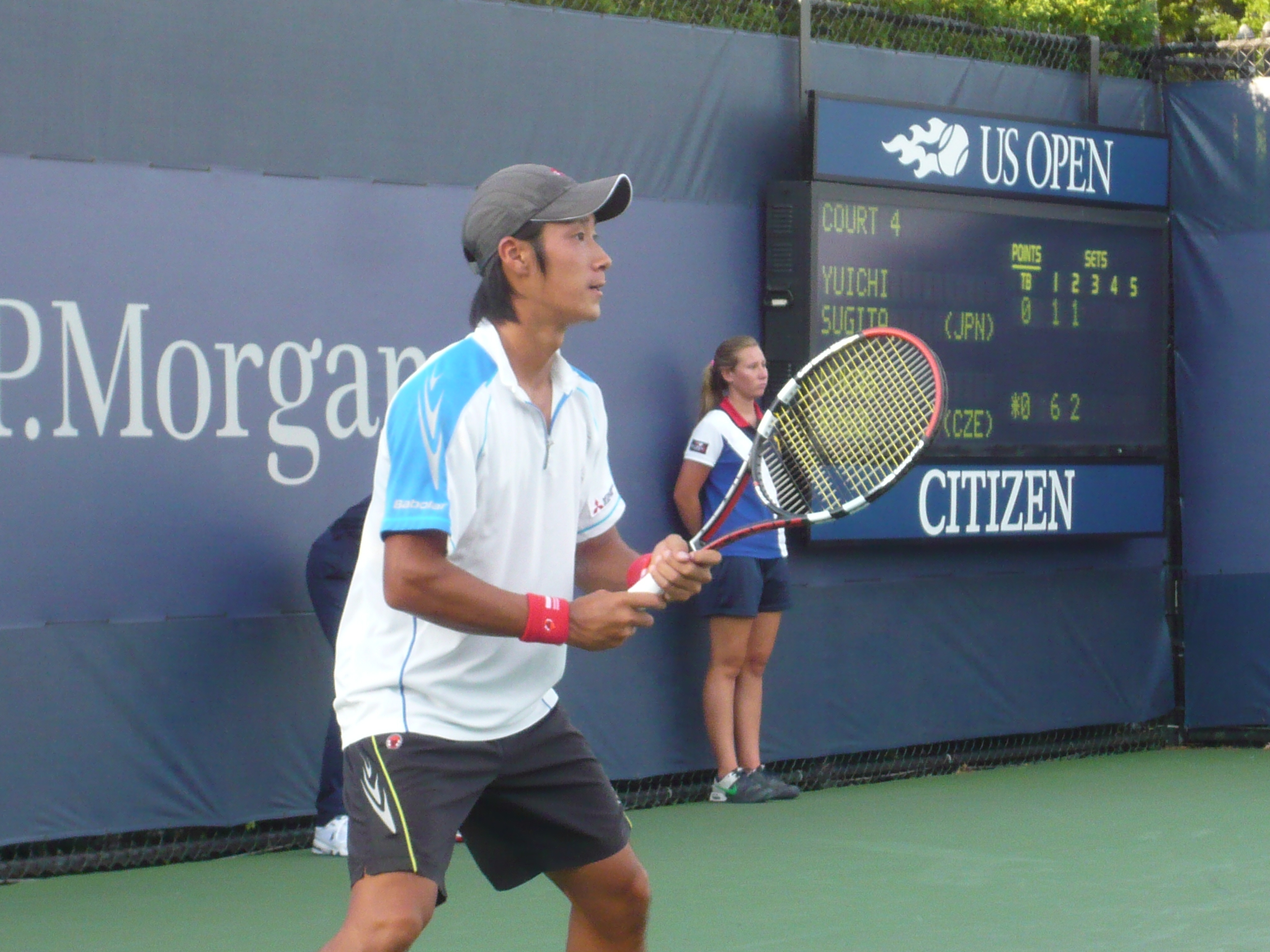 Yuichi Sugita